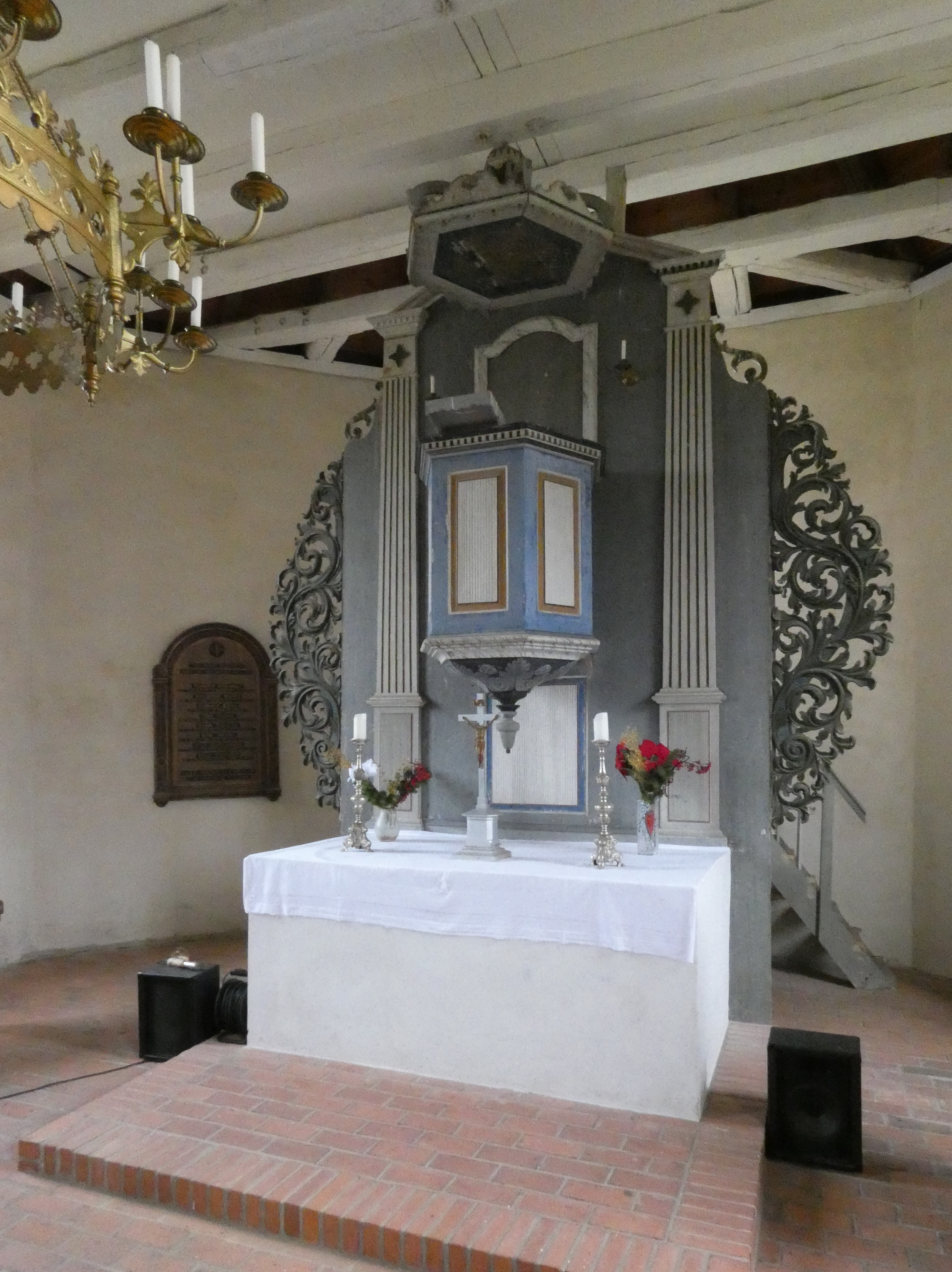 Dorfkirche Saaringen innen, Kanzelaltar